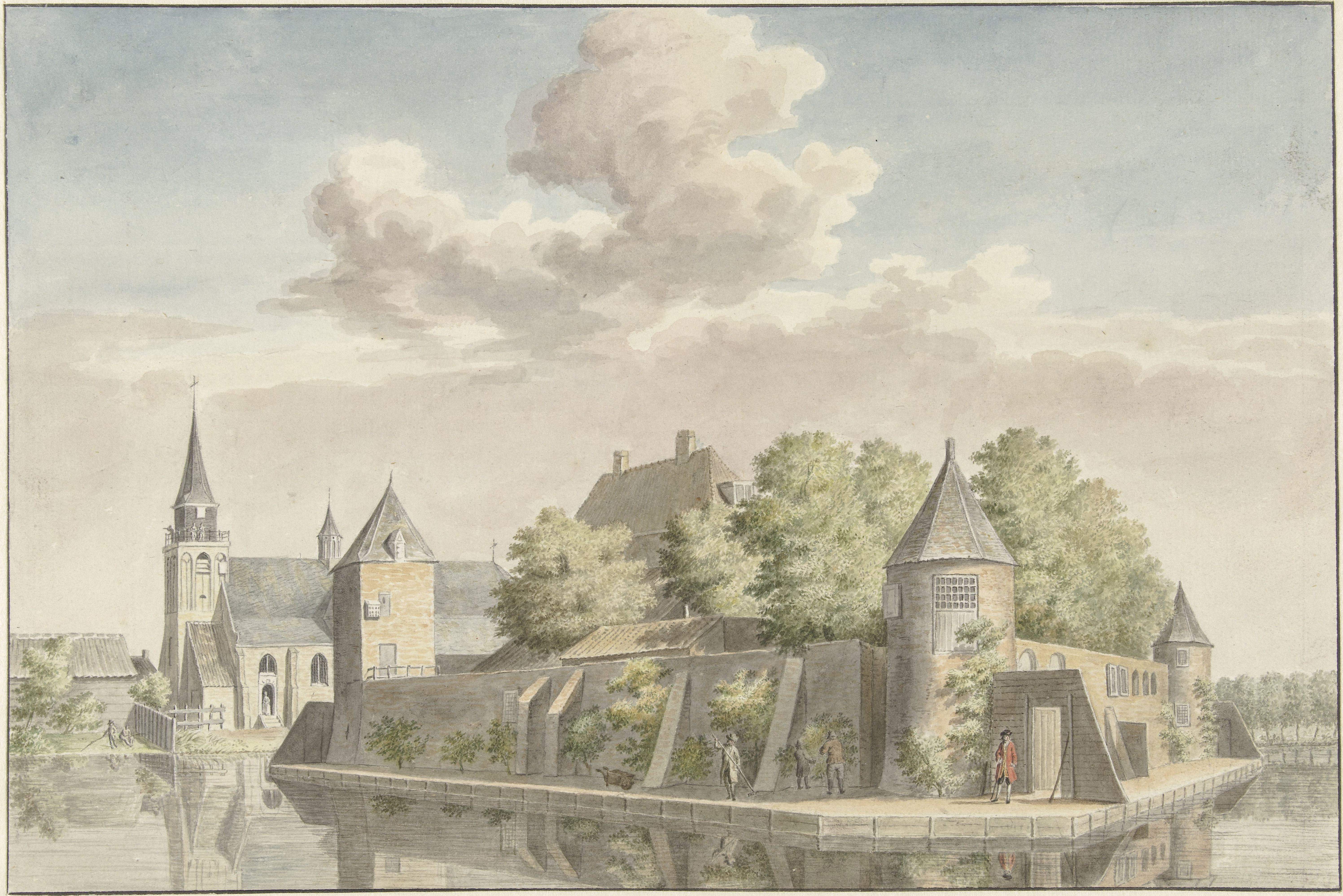 Het Hof van Putten en de kerk van Geervliet. Tekenaarː Cornelis Pronk (mogelijk). Tekening, aquarelː pen in grijs, penseel in waterverf in kleuren. Eigenaarː Rijksmuseum, objectnummerː RP-T-1896-A-3126. Afmetingenː h 180 mm × b 269 mm.